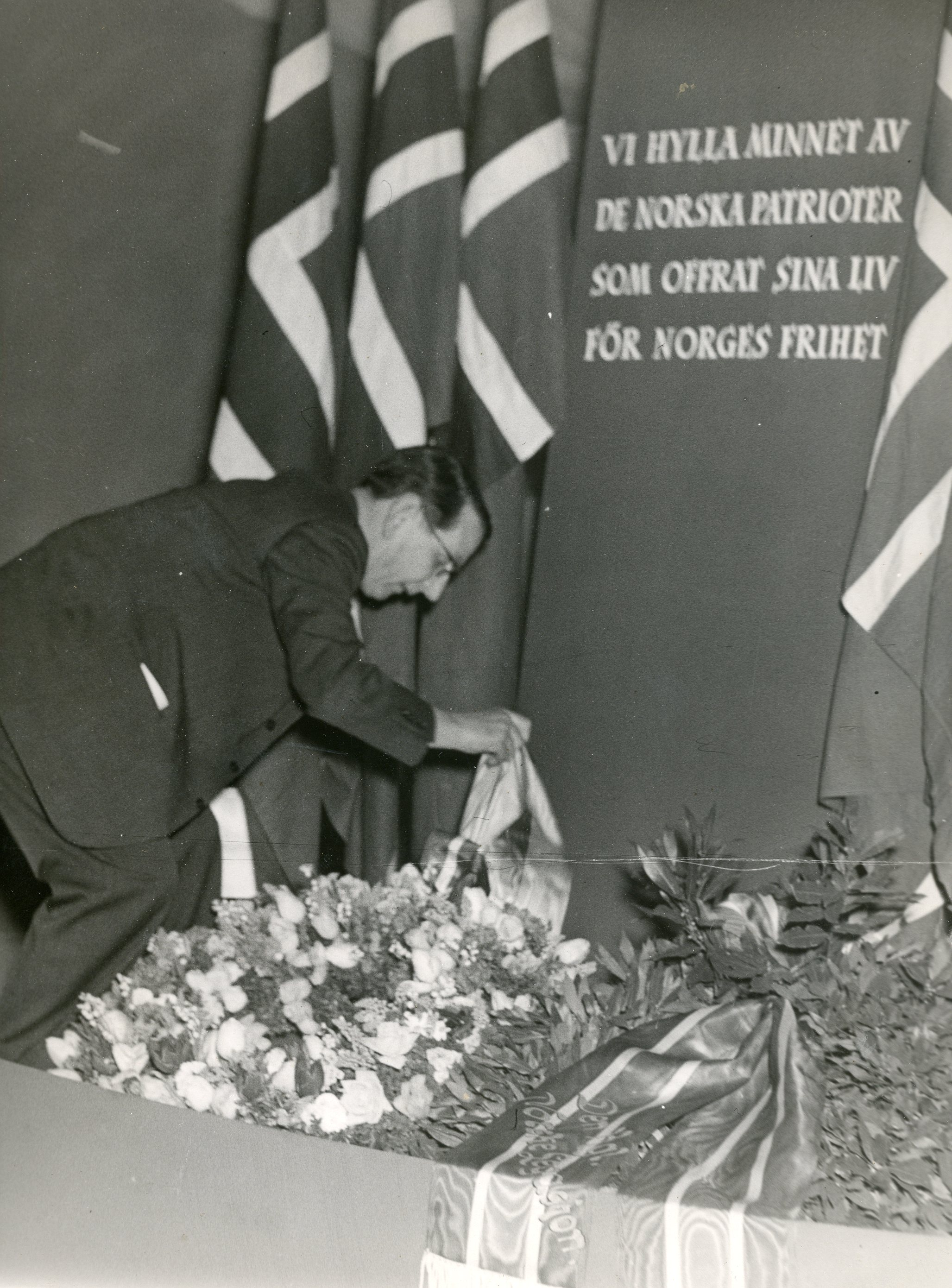 Svensk-norske foreningen arrangerte om morgenen 9. april 1943 en minnehøytidelighet i Thulehuset for de norske patrioter som ofret sine liv for Norges frihet. Bildet viser borgarrådet Yngve Larsson som nedlegger krans ved minnetavlen. RA/PA-1209/Uc/66/4/L 6640/S 1906